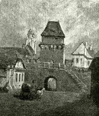 Az egykori kolozsvári Magyar utcai kapu. 1872-ben bontották el